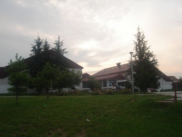 Основна школа Никола Тесла у Винчи